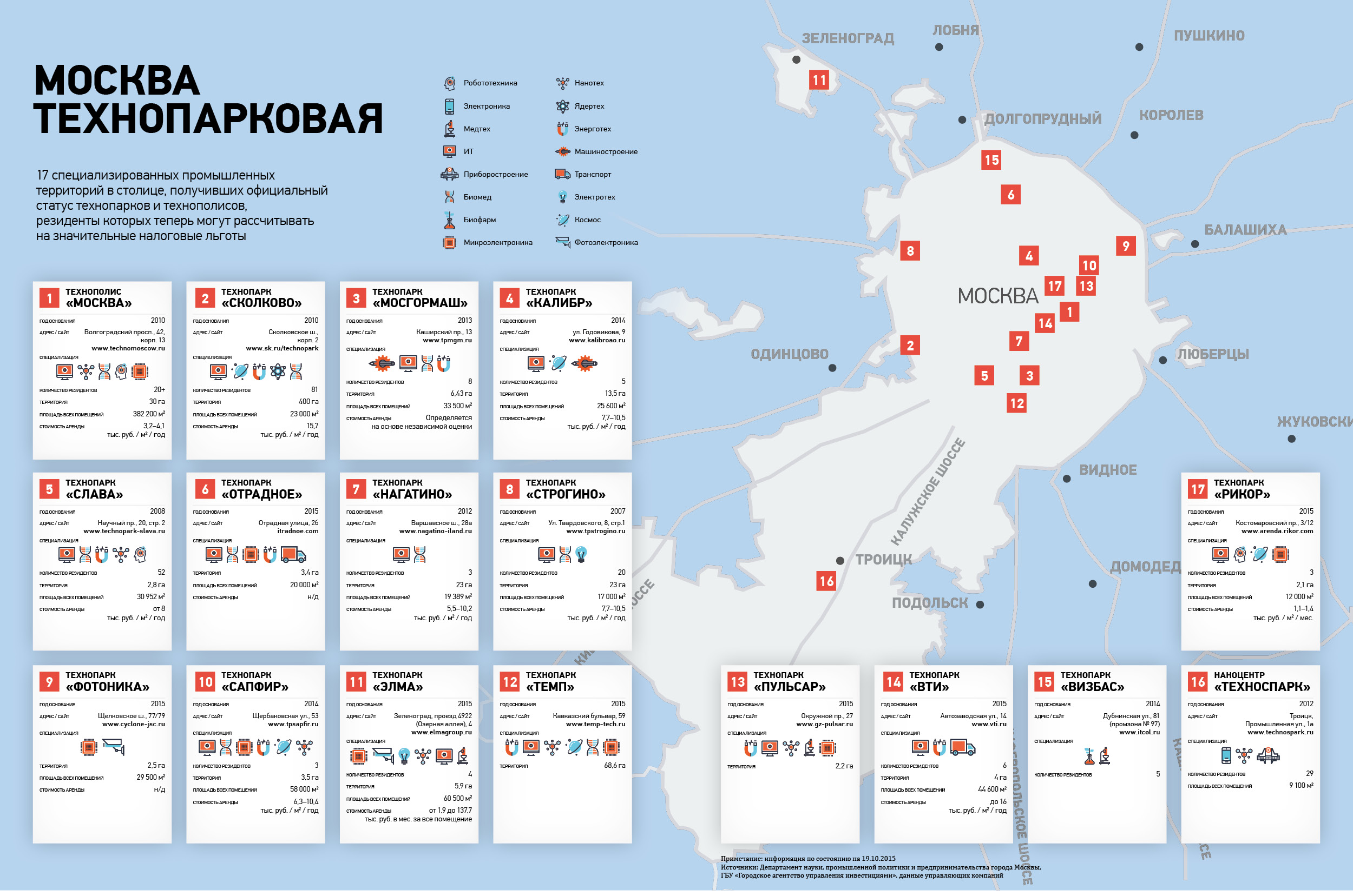 Технопарки Москвы по состоянию на 19.10.2015